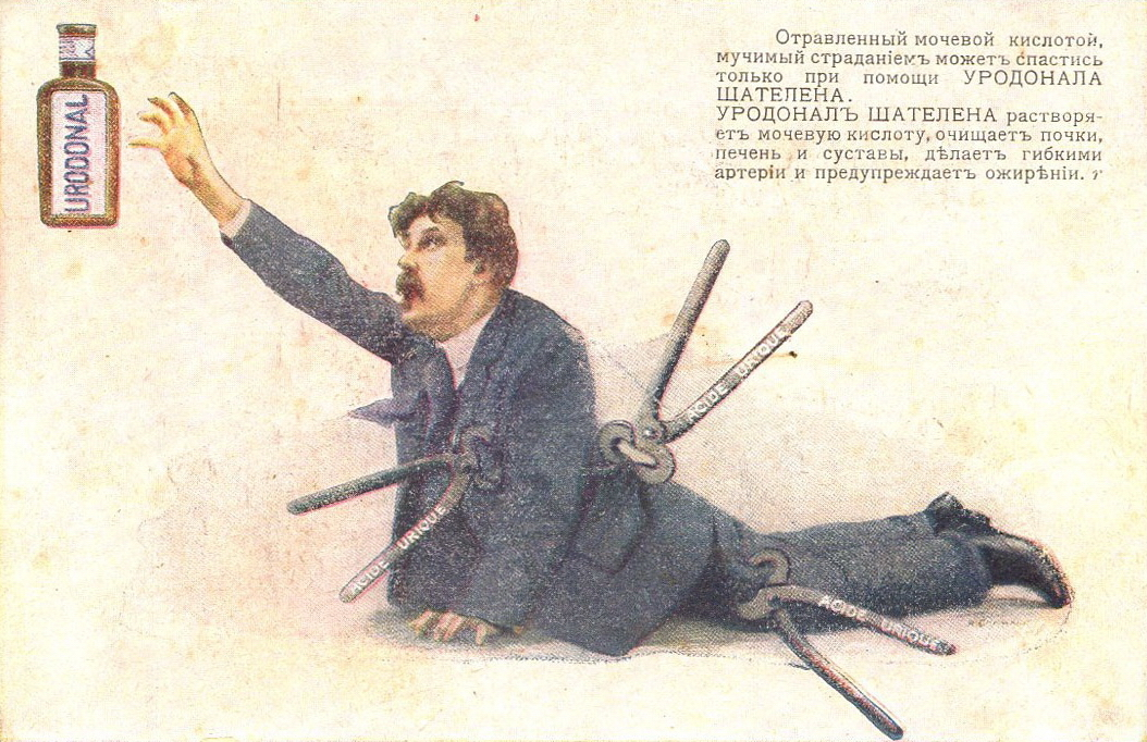 Уродонал Шателена (реклама)